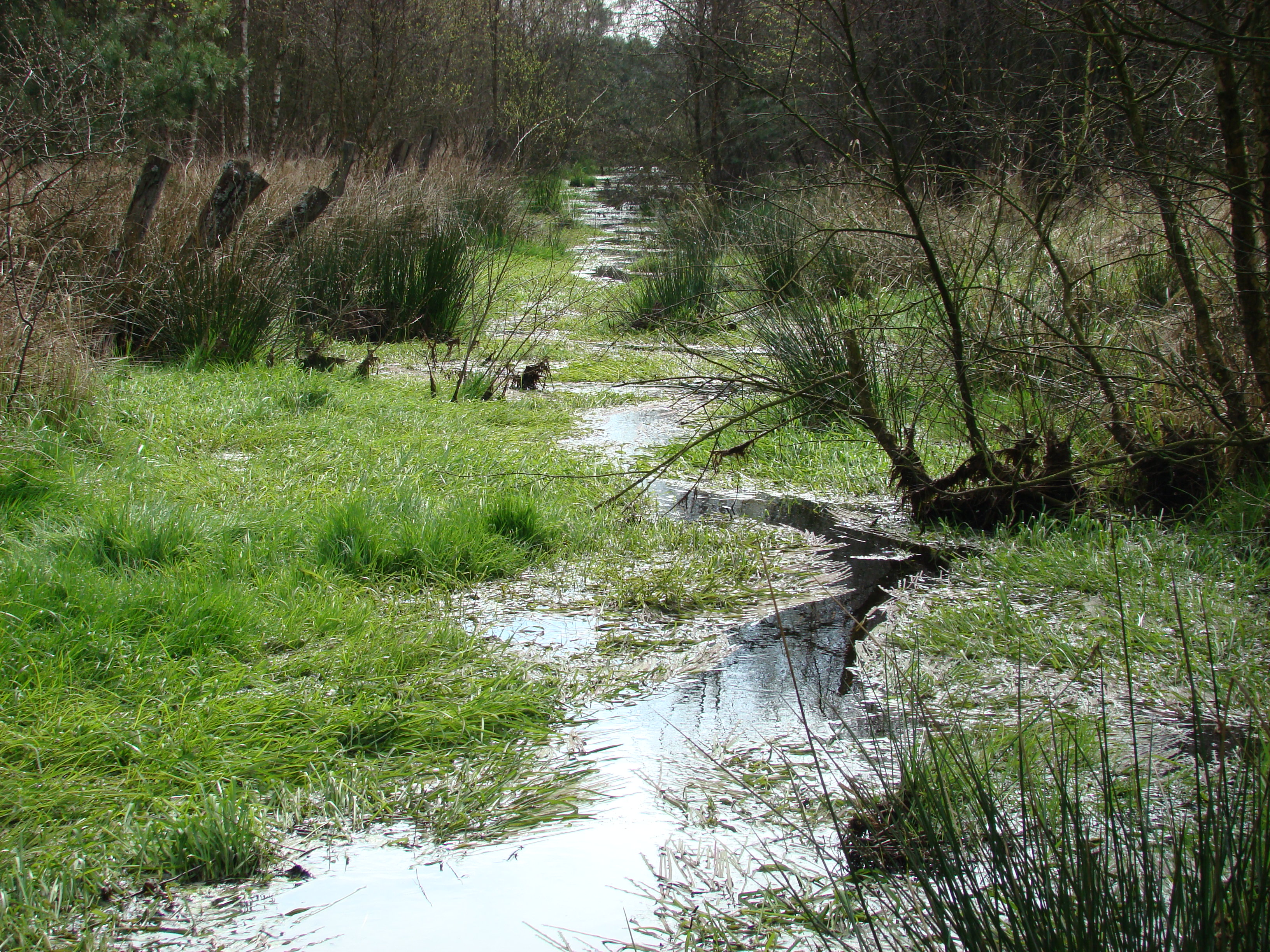 Rückgestauter Abzugsgraben im Hetendorfer Moor (Naturpark Südheide)